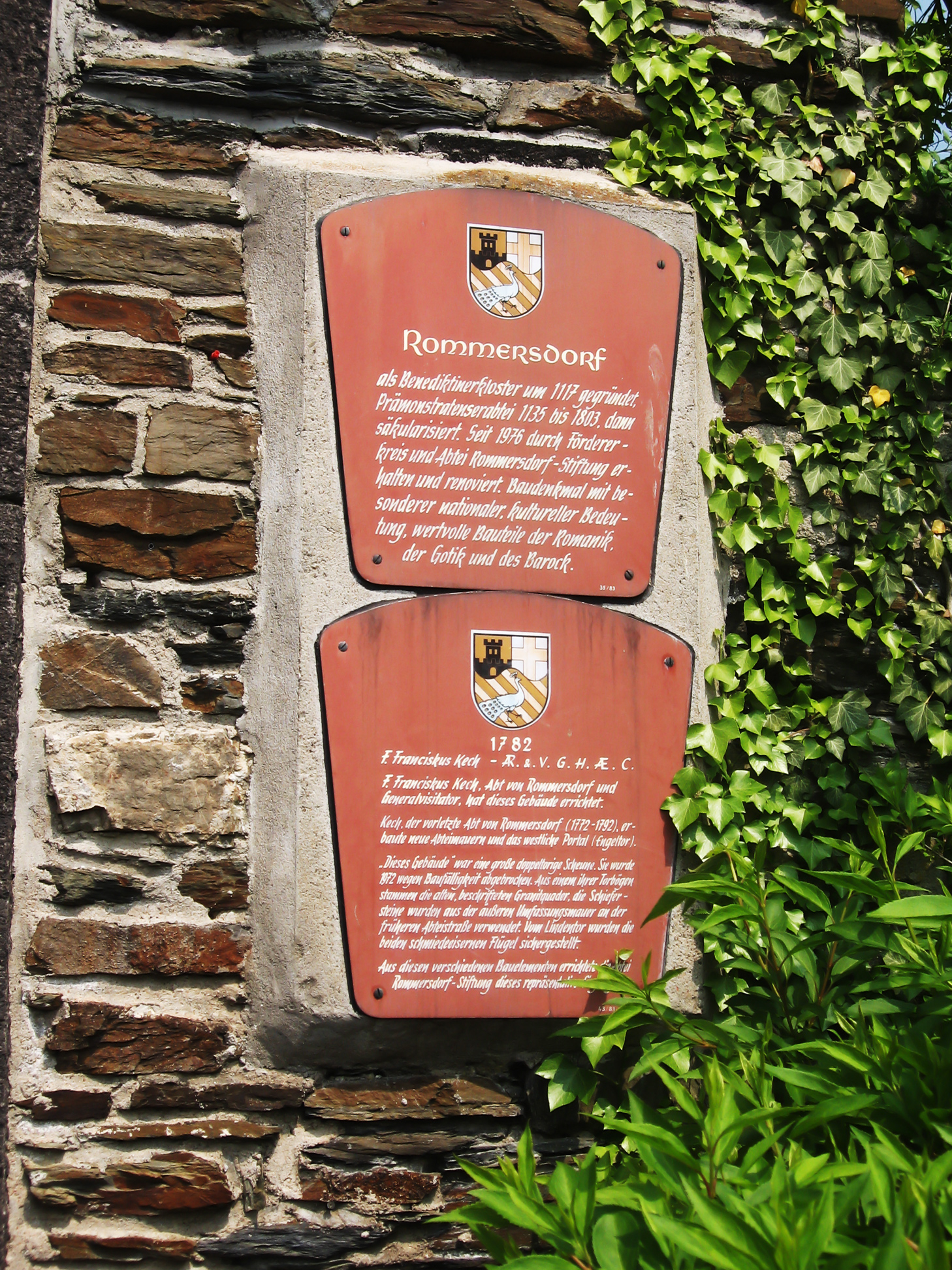 Plaketten am Eingangstor der Prämonstratenserabtei Rommersdorf in Heimbach-Weis (Neuwied).